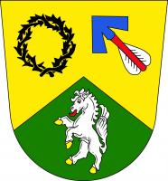 Mojné, znak